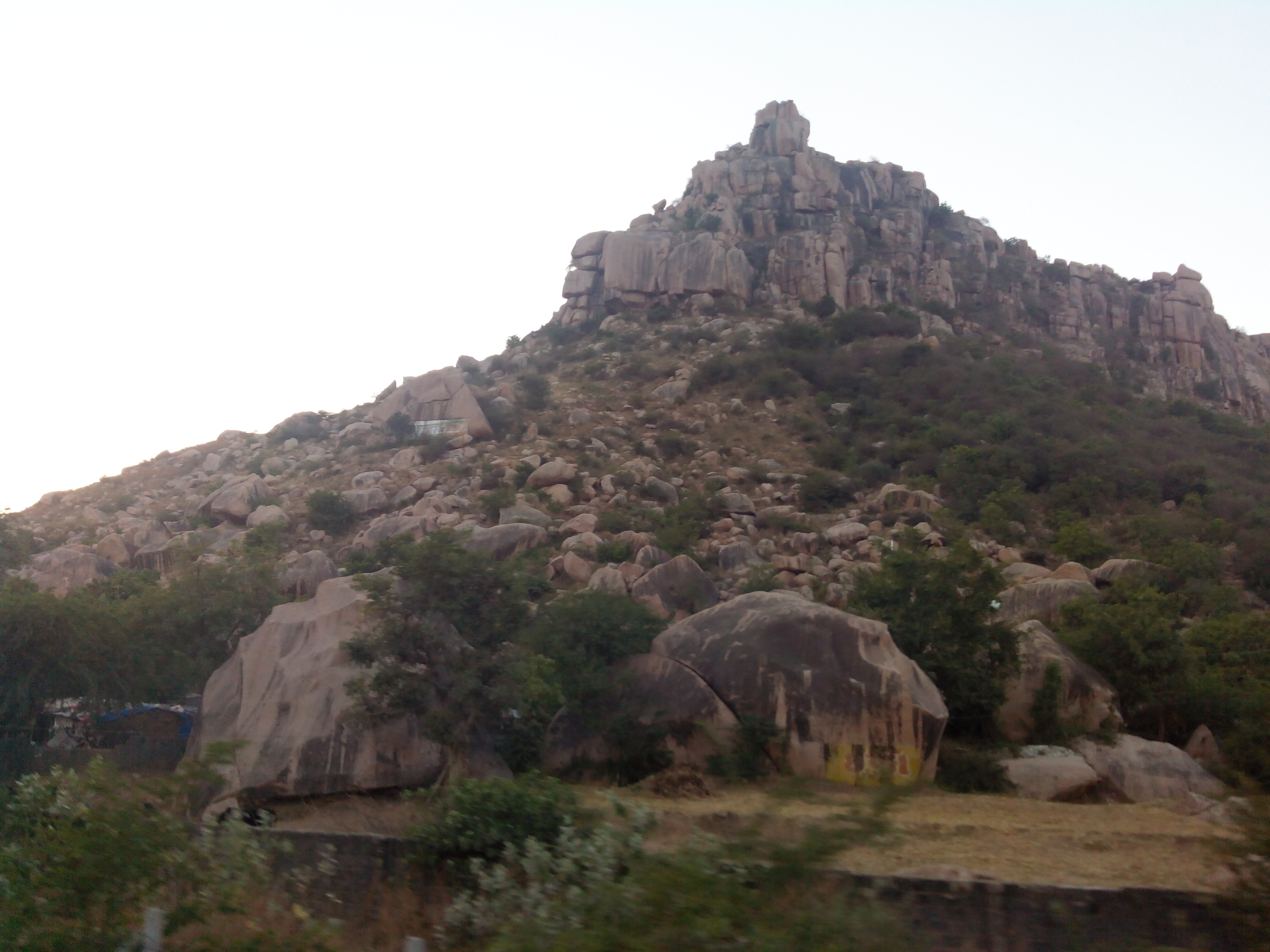 Idar hills of Aravalli range at Idar, Gujarat, India